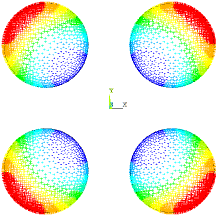 Zjawisko zbliżenia w czterech równoległych przewodach w których prąd płynie w tym samym kierunkuUnknownUnknown proximity effect in four parallel wires with current in the same direction